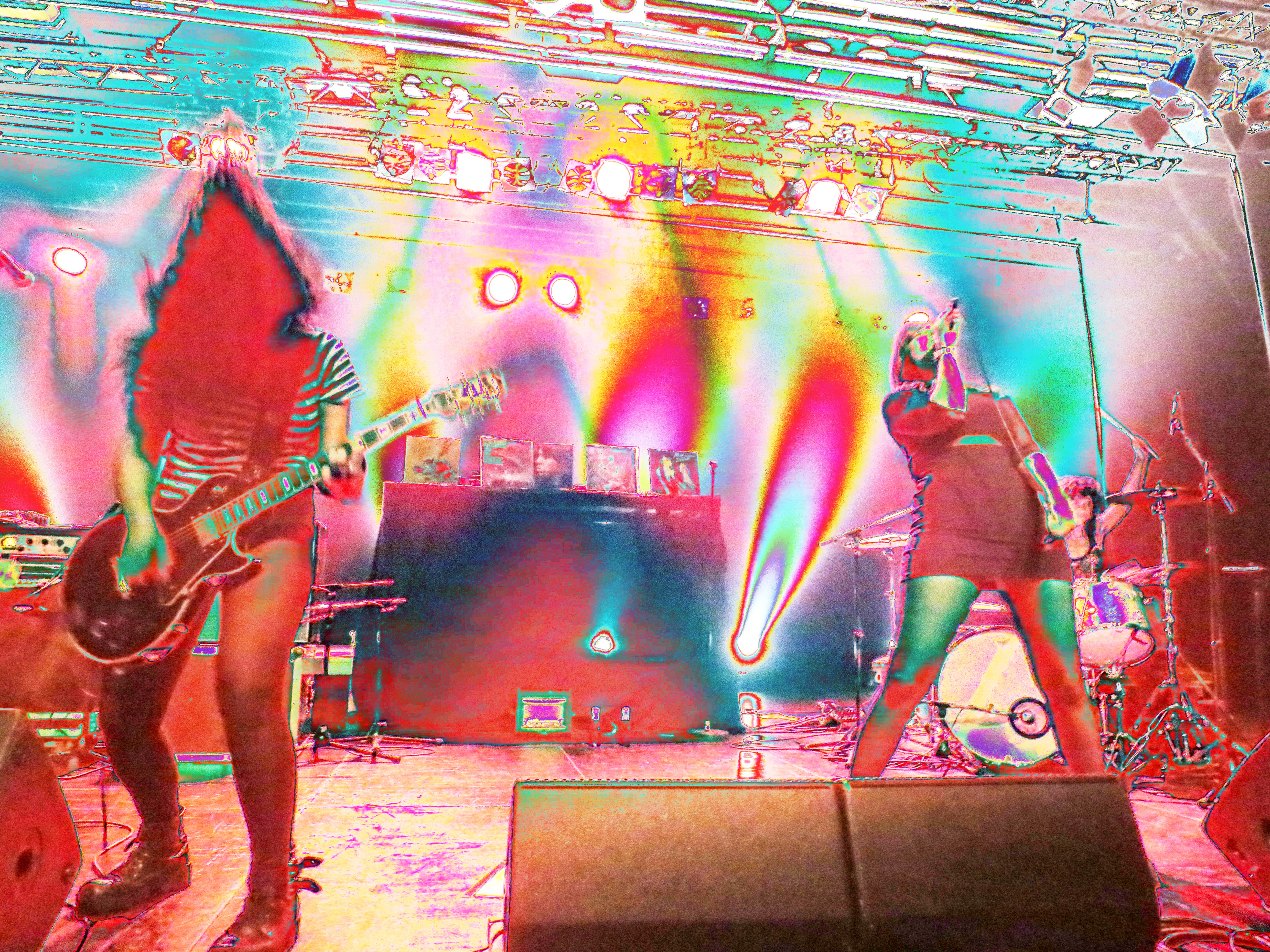 Zuloak taldea, Egiako Gazteszenan